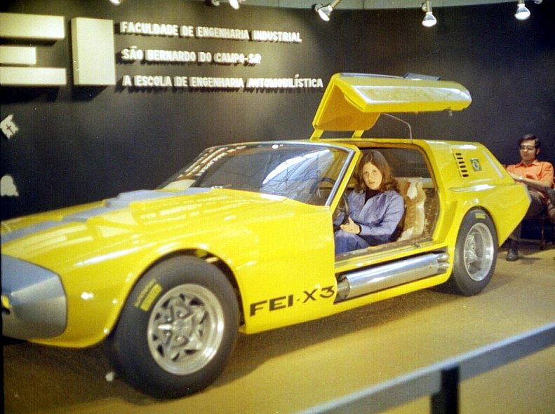 Fei X3 Protótipo - 1971